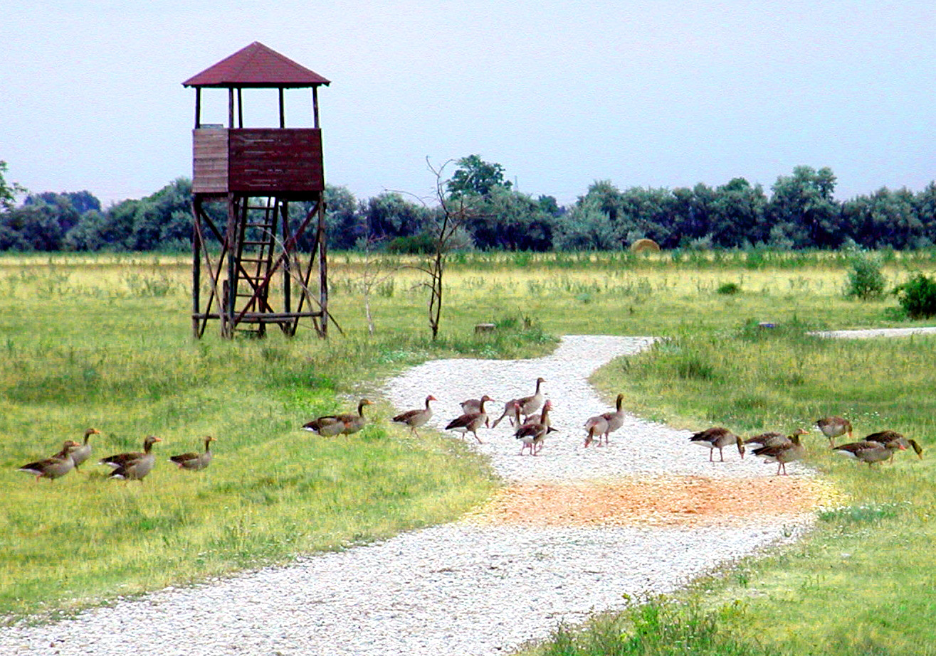 Graugänse im Nationalpark Neusielersee - Seewinkel